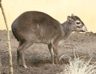 Maxwell's Duiker